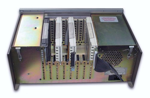 Foto eines Texas Instruments TI Peripheral Expansion System (Rückansicht)